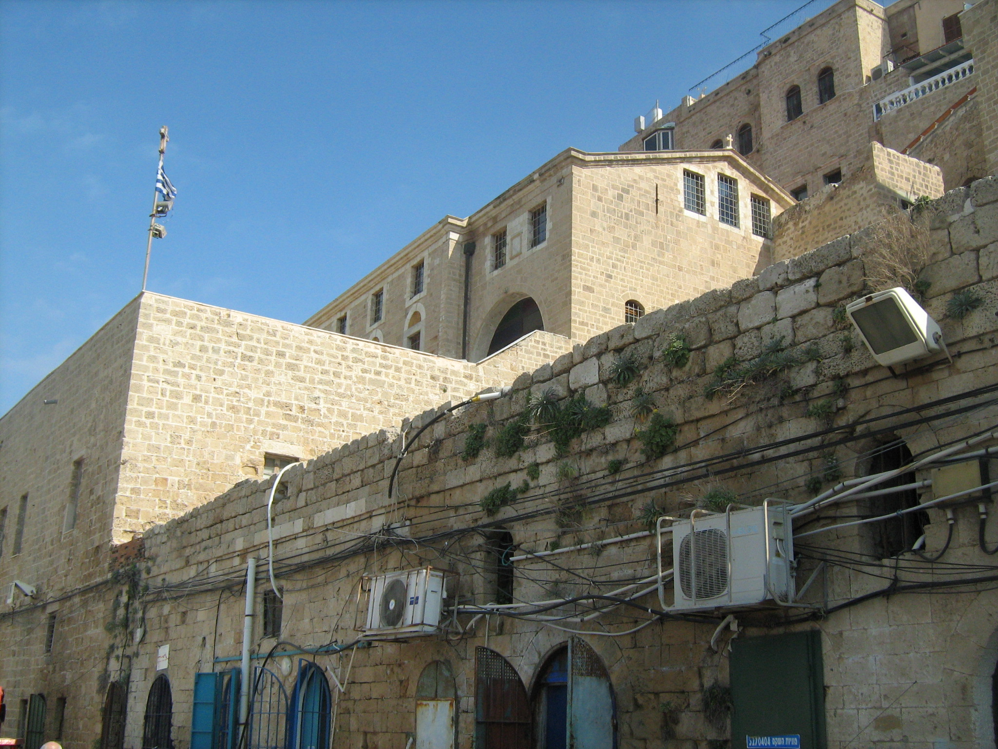 הכנסייה היוונית אורתודוקסית מיכאל הקדוש ביפו